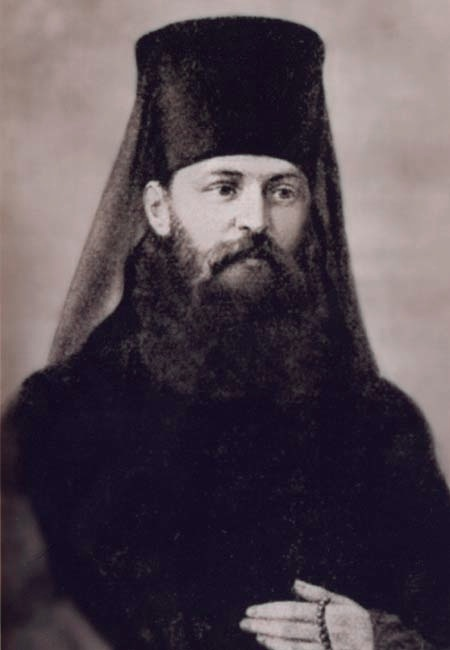 Иннокентий Сибиряков — русский меценат и благотворитель.